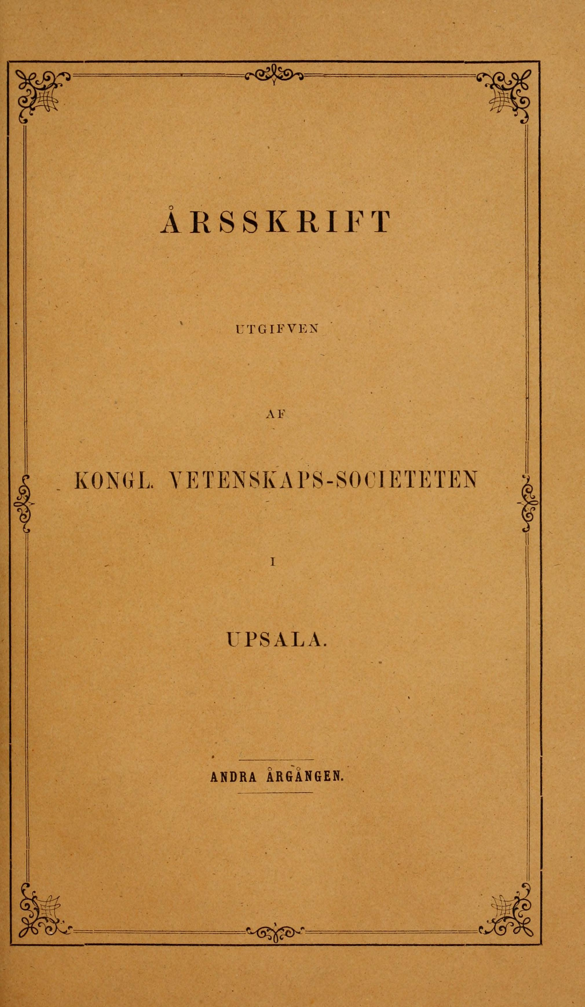 Årsskrift / Kongl. Vetenskaps-societen i Upsala.